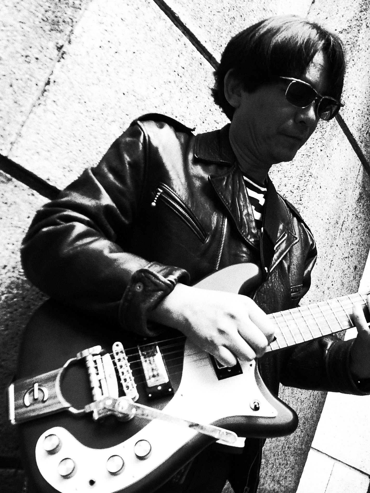 ピンキー青木、2012年10月のイメージショット